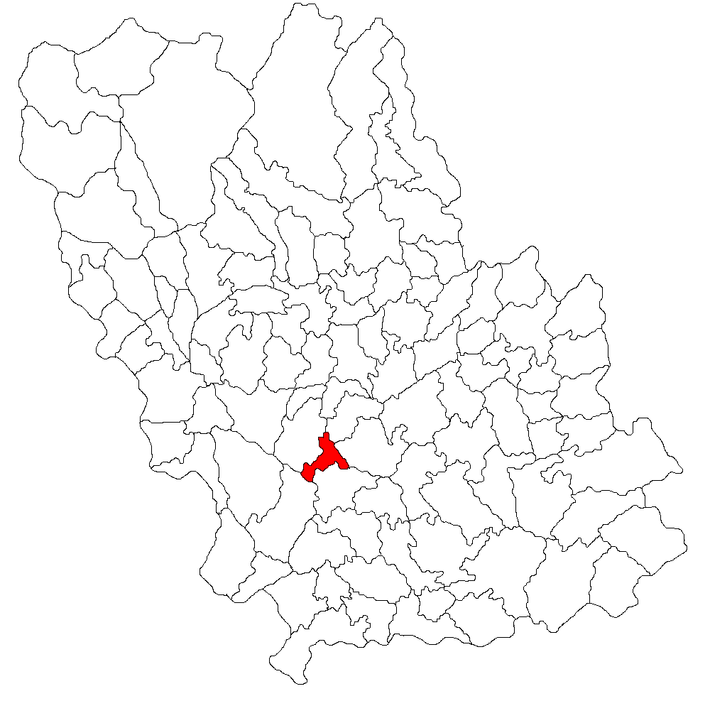 Categorie:Hărţi ale judeţului Prahova